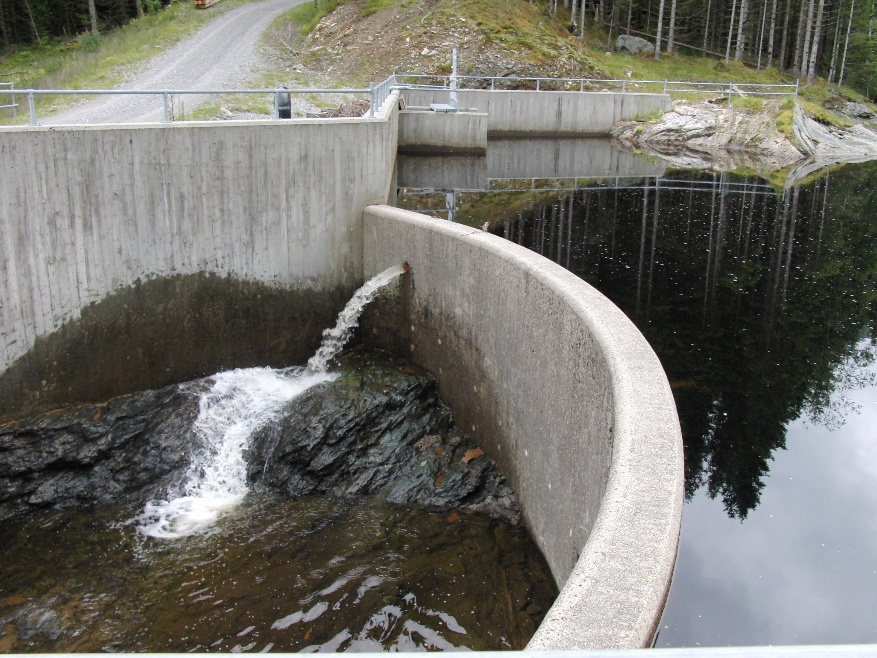 Oma kraftverk, inntaksdam